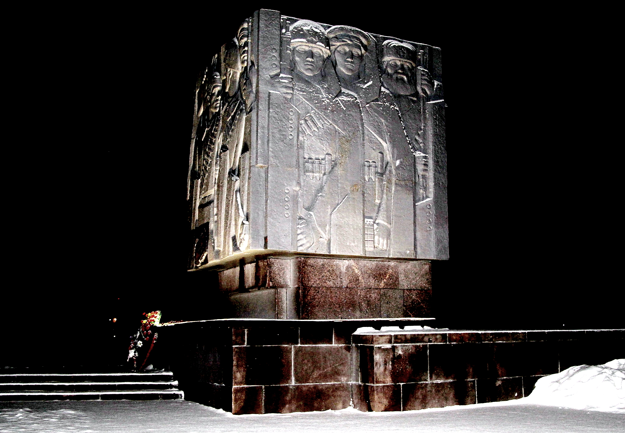 Мемориал "Невский пятачок" накануне 70-летия Победы в Великой Отечественной войне обрел новый облик — 4 мая здесь была включена художественная подсветка